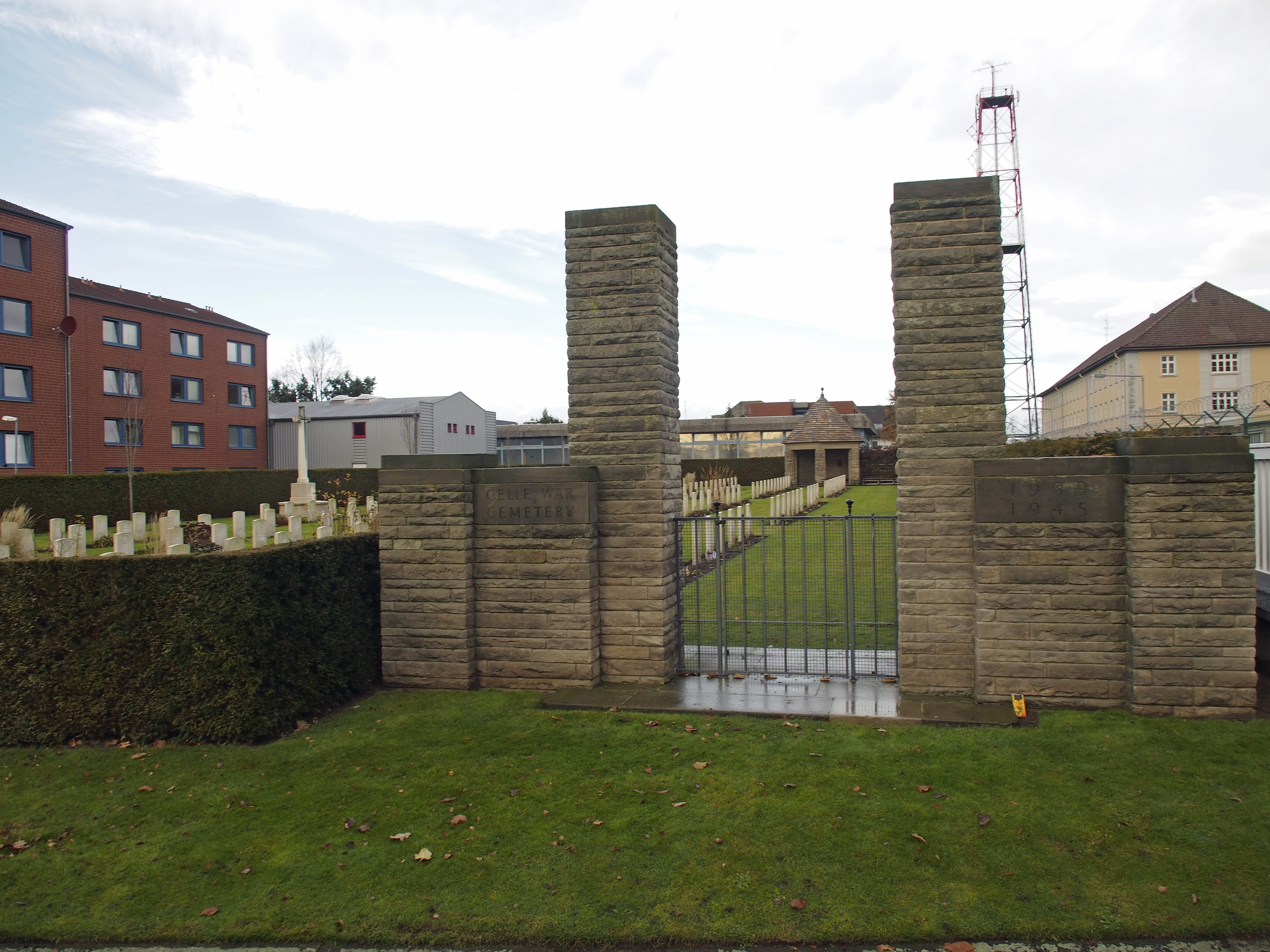 Celle War Cemetery Eingang, Niedersachsen, Germany